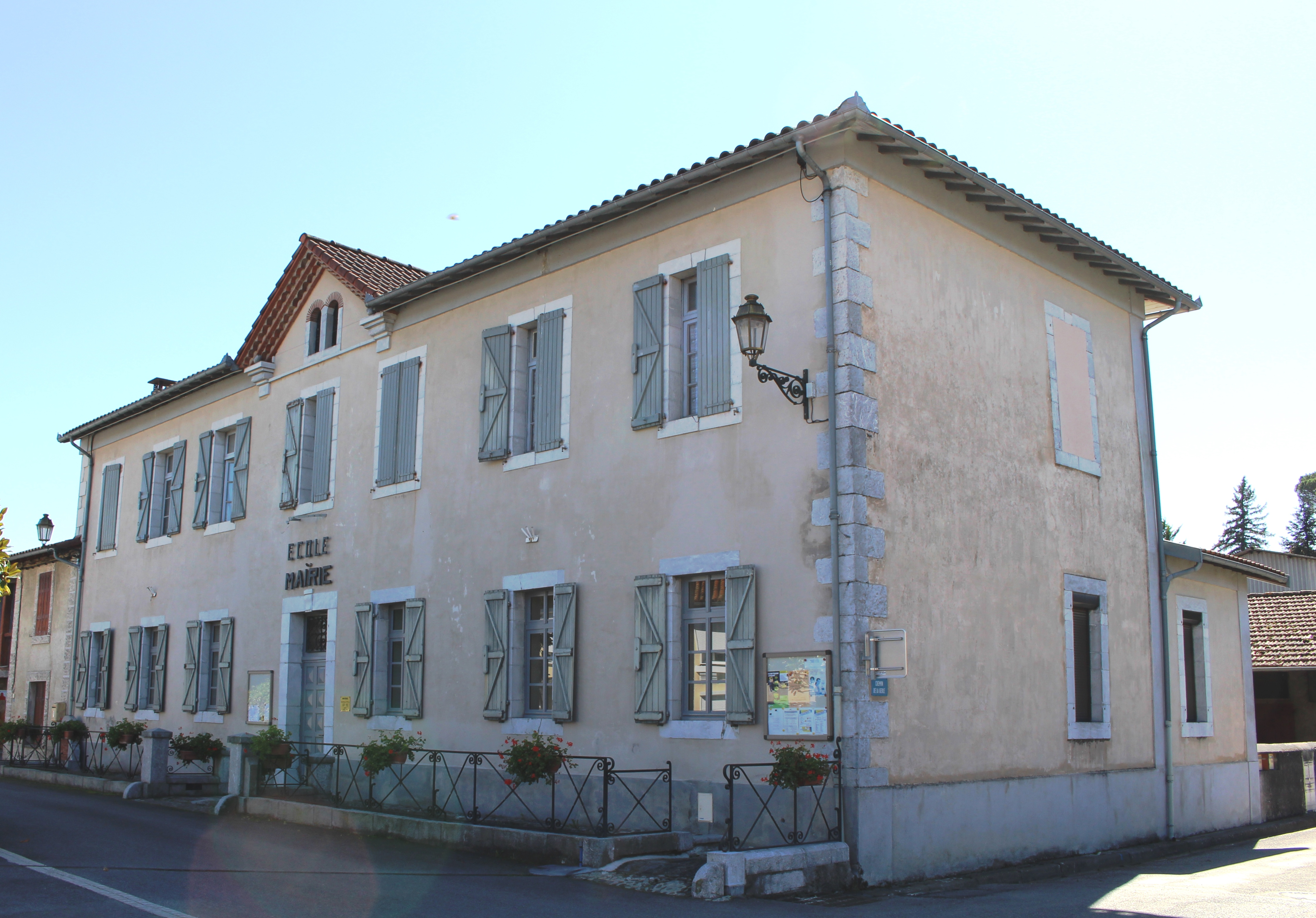 Mairie de Mazères-de-Neste (Hautes-Pyrénées)